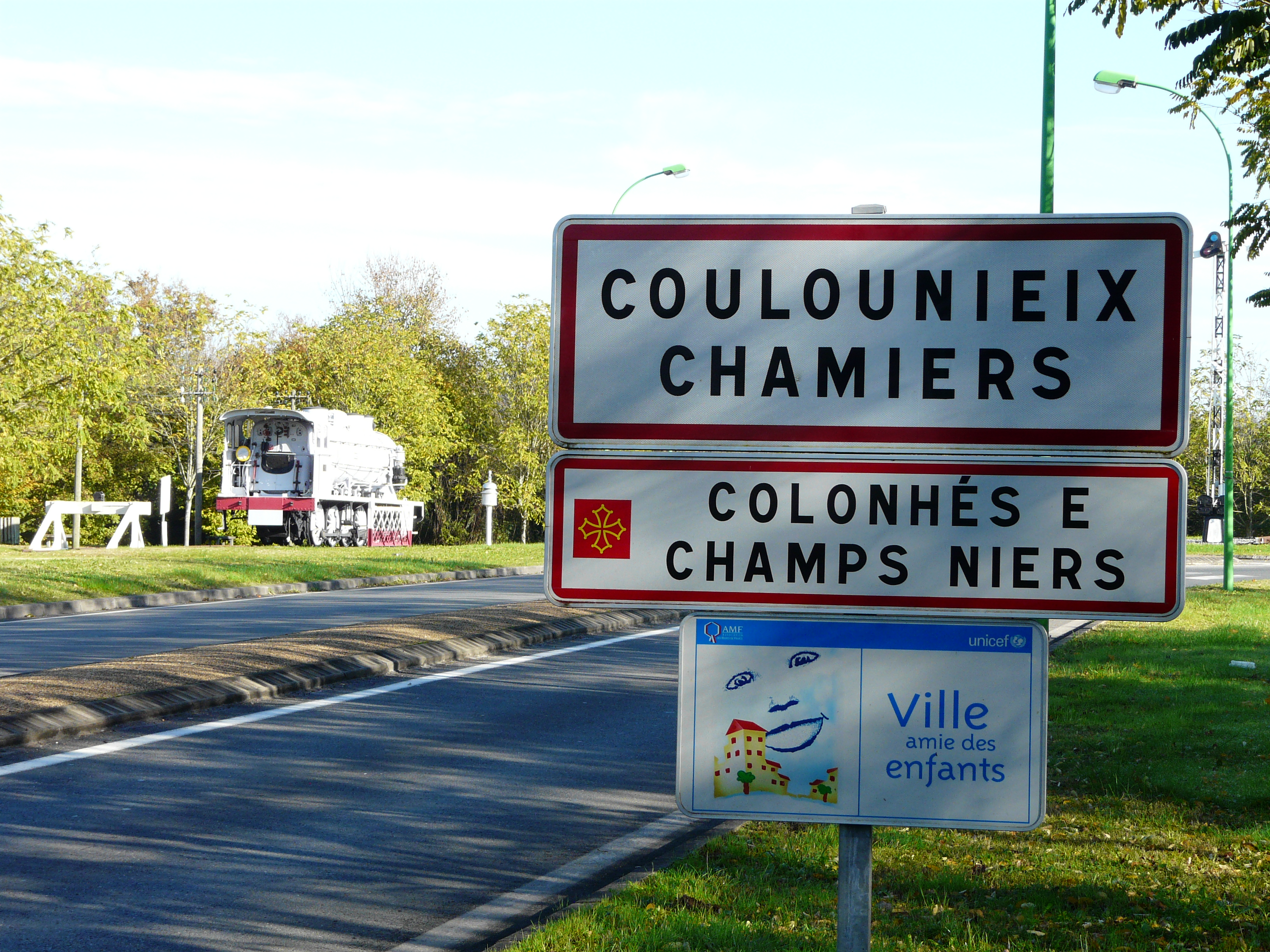 Panneau d'entrée en français et occitan à Coulounieix-Chamiers, Dordogne, France.